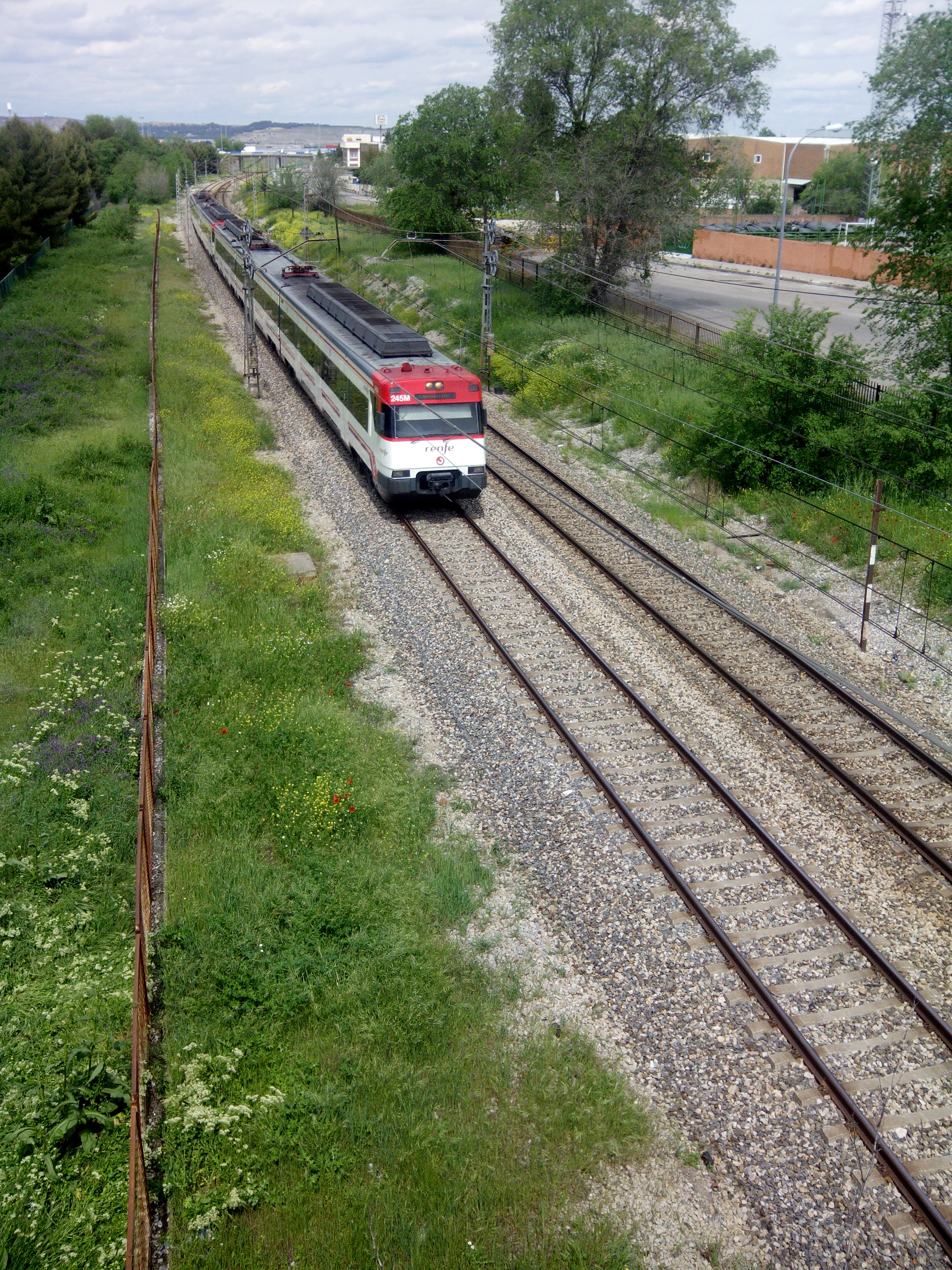 Línea de ffcc, llegada, Corredor de Henares.